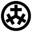 伊集院氏家紋